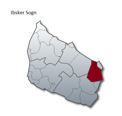 Ibsker sogn